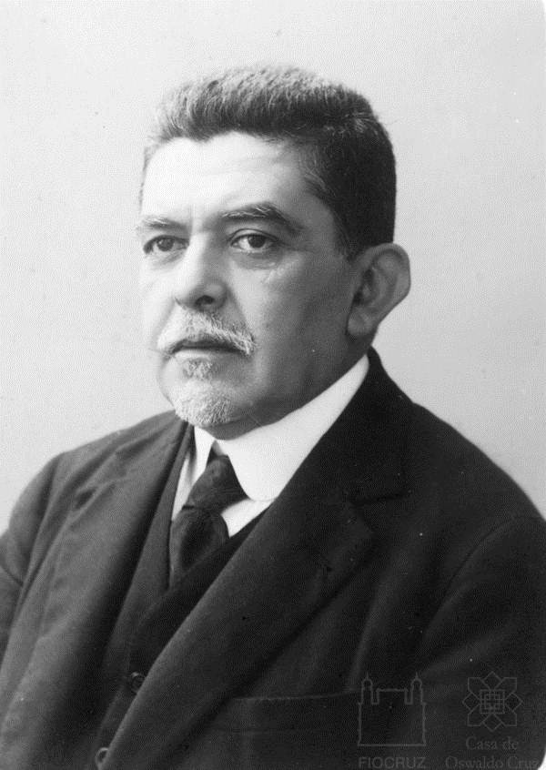 Escritor e médico sanitarista brasileiro.